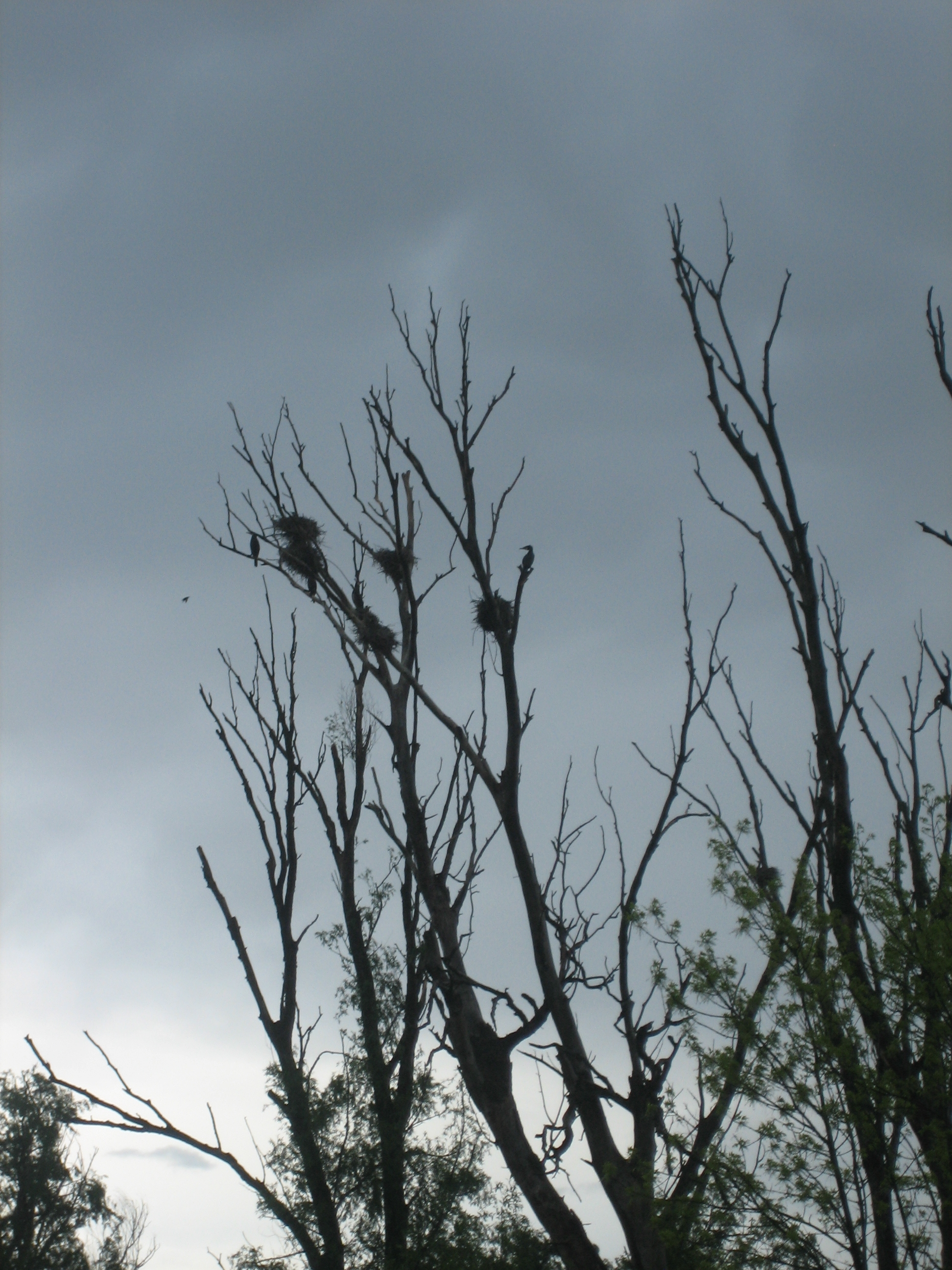 Kopački rit, a nature park in Baranja, eastern Croatia / Park prirode Kopački rit u Baranji.